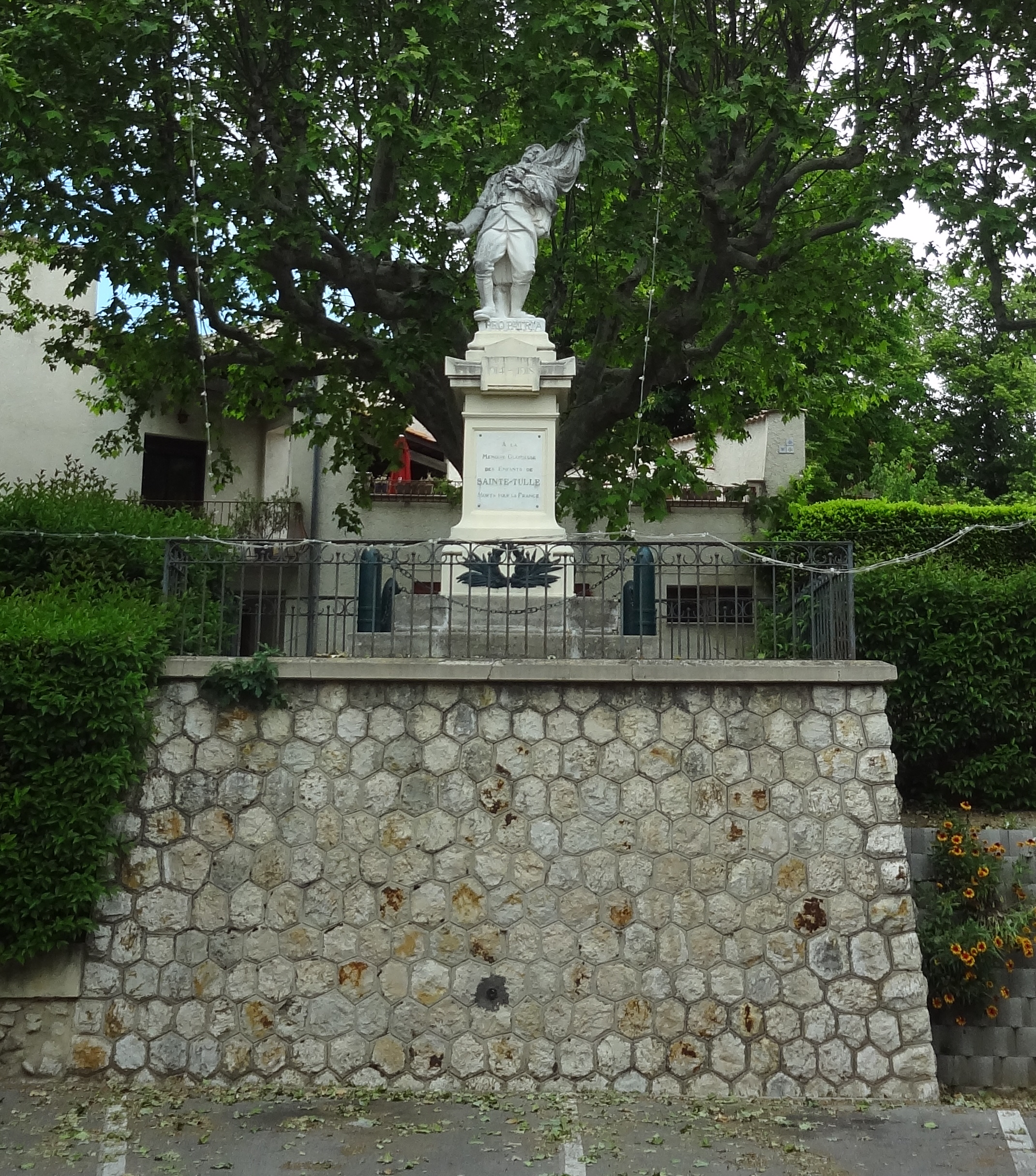 Monument aux morts de Sainte-Tulle